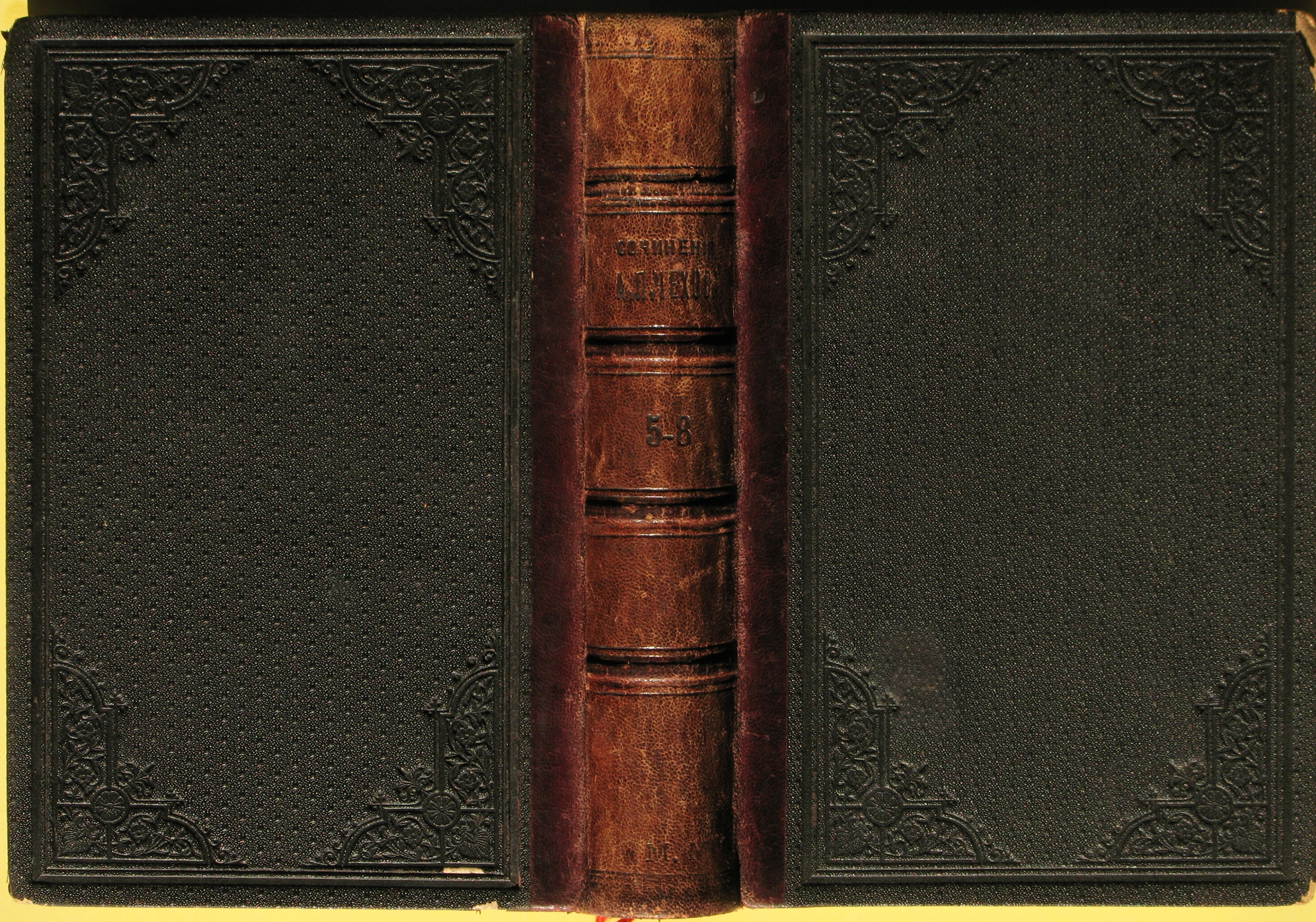 Переплёт прижизненного собрания сочинений (СС) Антона Павловича Чехова в 16 томах издательства Адольфа Маркса. 1903. Тома высылались подписчикам в мягких обложках, а после выхода можно было заказать в издательстве за отдельную плату переплёты.